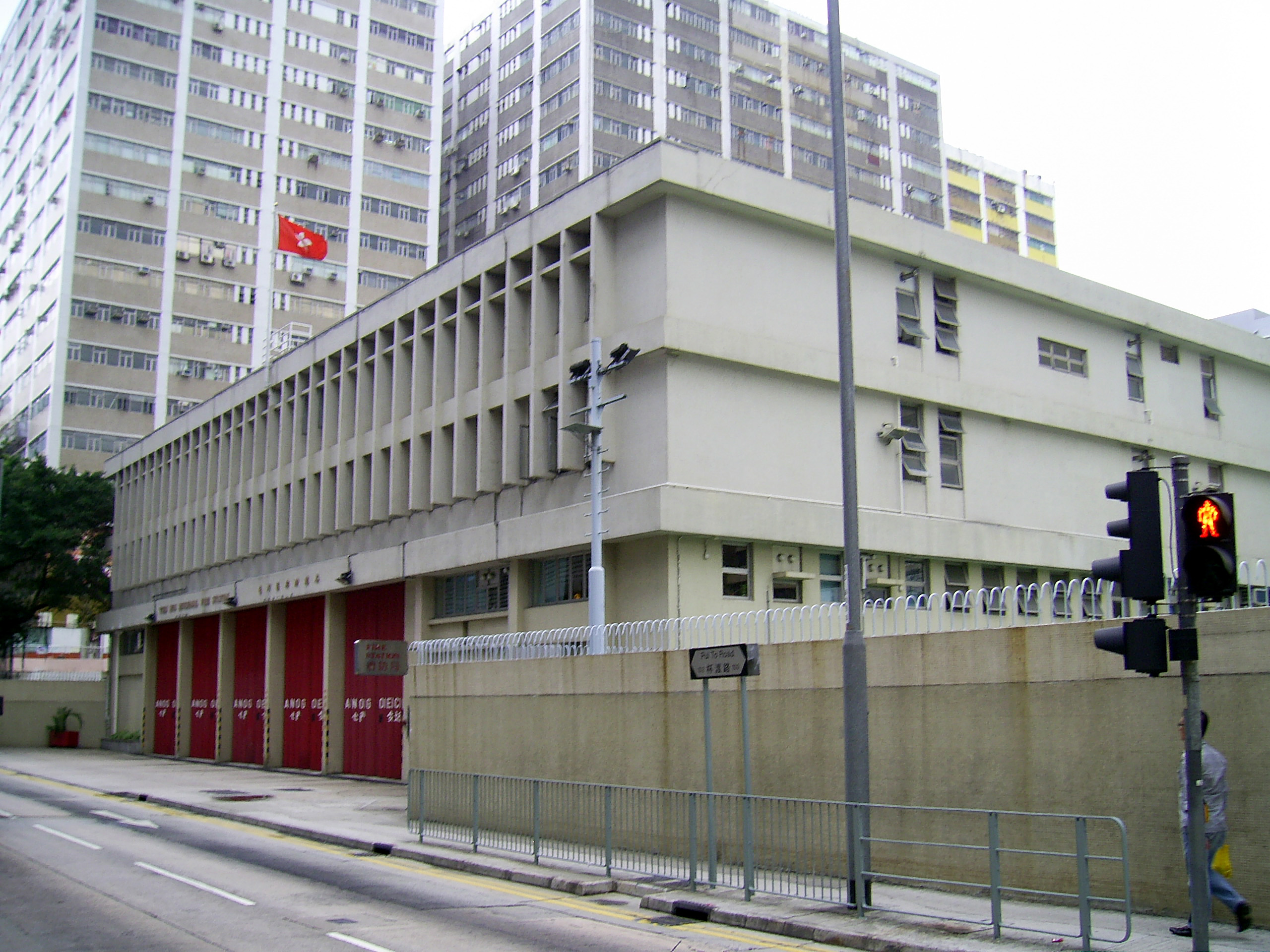 中文（香港）: 屯門消防局